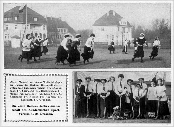 Damen-Hockeymannschaft des ASV 1910 gegen den Berliner HC